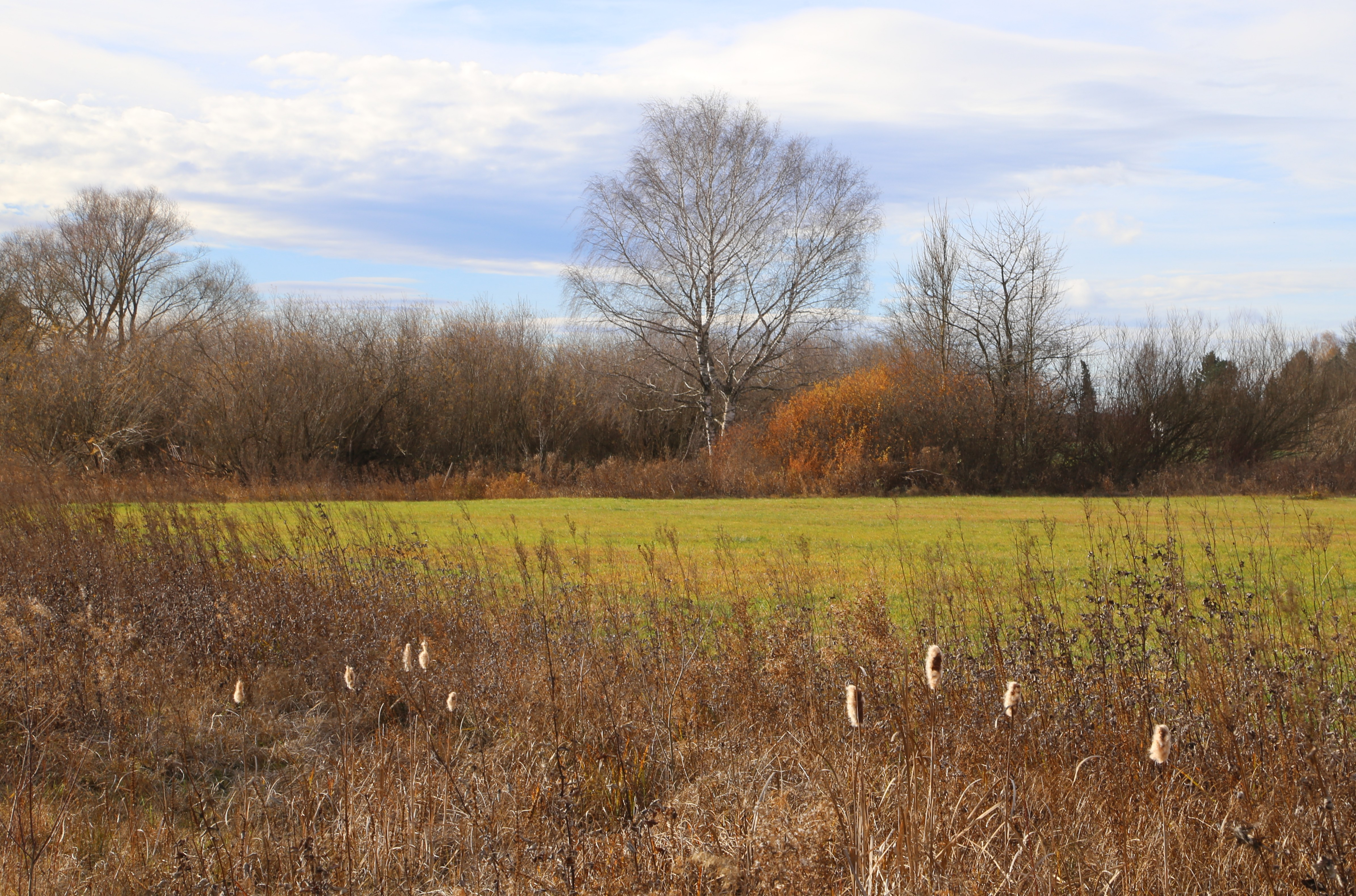 Landschaftsschutzgebiet "Hachinger Tal im Gebiet der Gemeinden Oberhaching und Taufkirchen" (LSG-00600.01), Taufkirchen